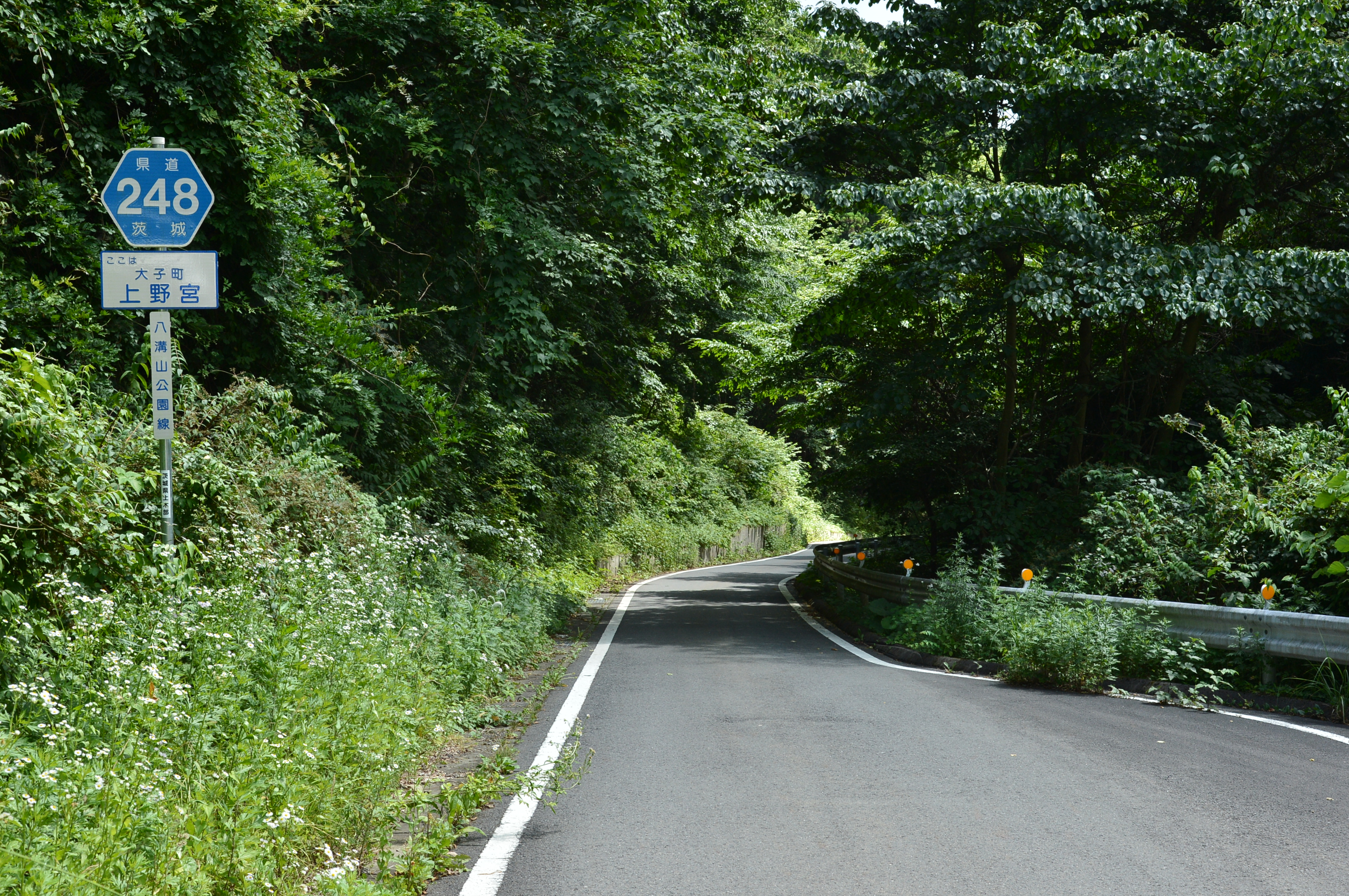 茨城県道248号八溝山公園線（久慈郡大子町上野宮）の道路状況